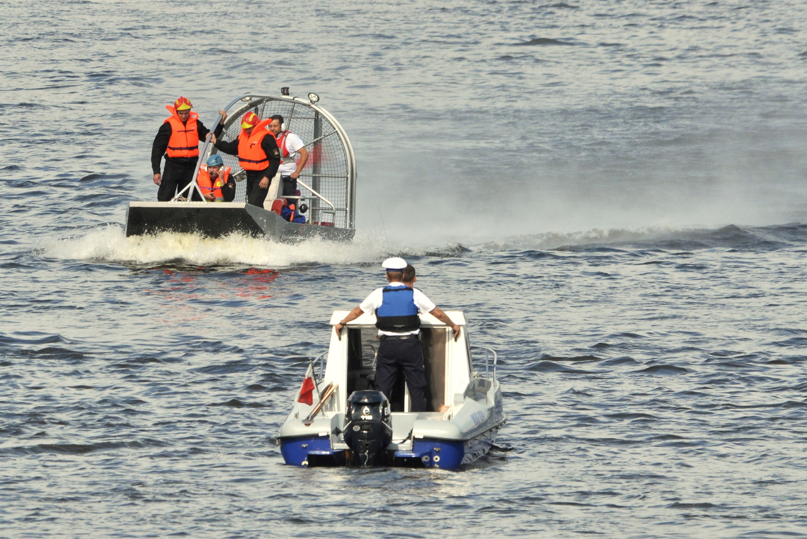 Airboat - łódź ratownicza napędzana śmigłem pchającym podczas działań ( ćwiczenia służb ratownictwa wodnego w Gorzowie - 2012 r.)